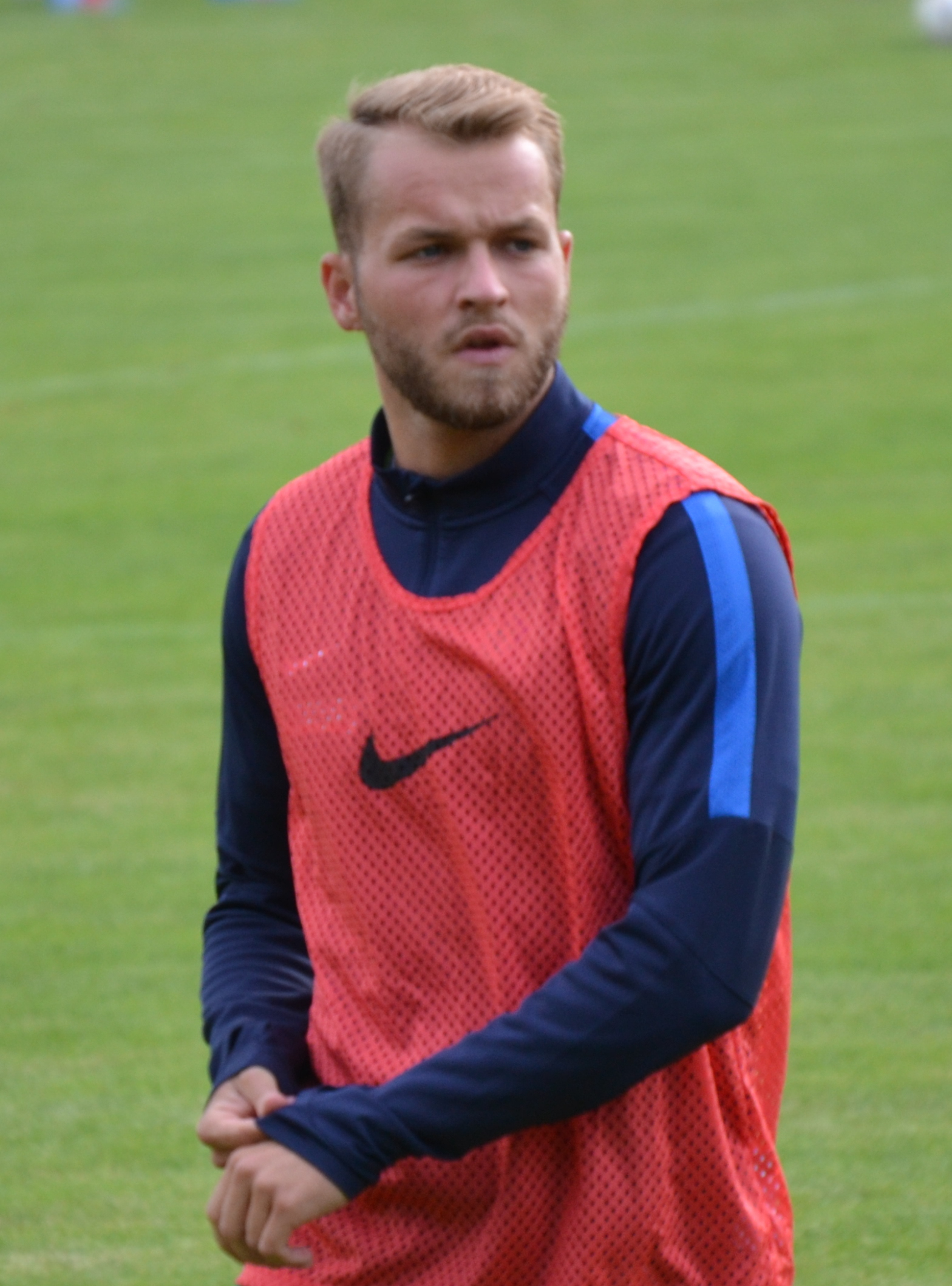 Pascal Köpke beim Aufwärmen vor dem Freundschaftsspiel von Erzgebirge Aue gegen den HFC Colditz im Juni 2016